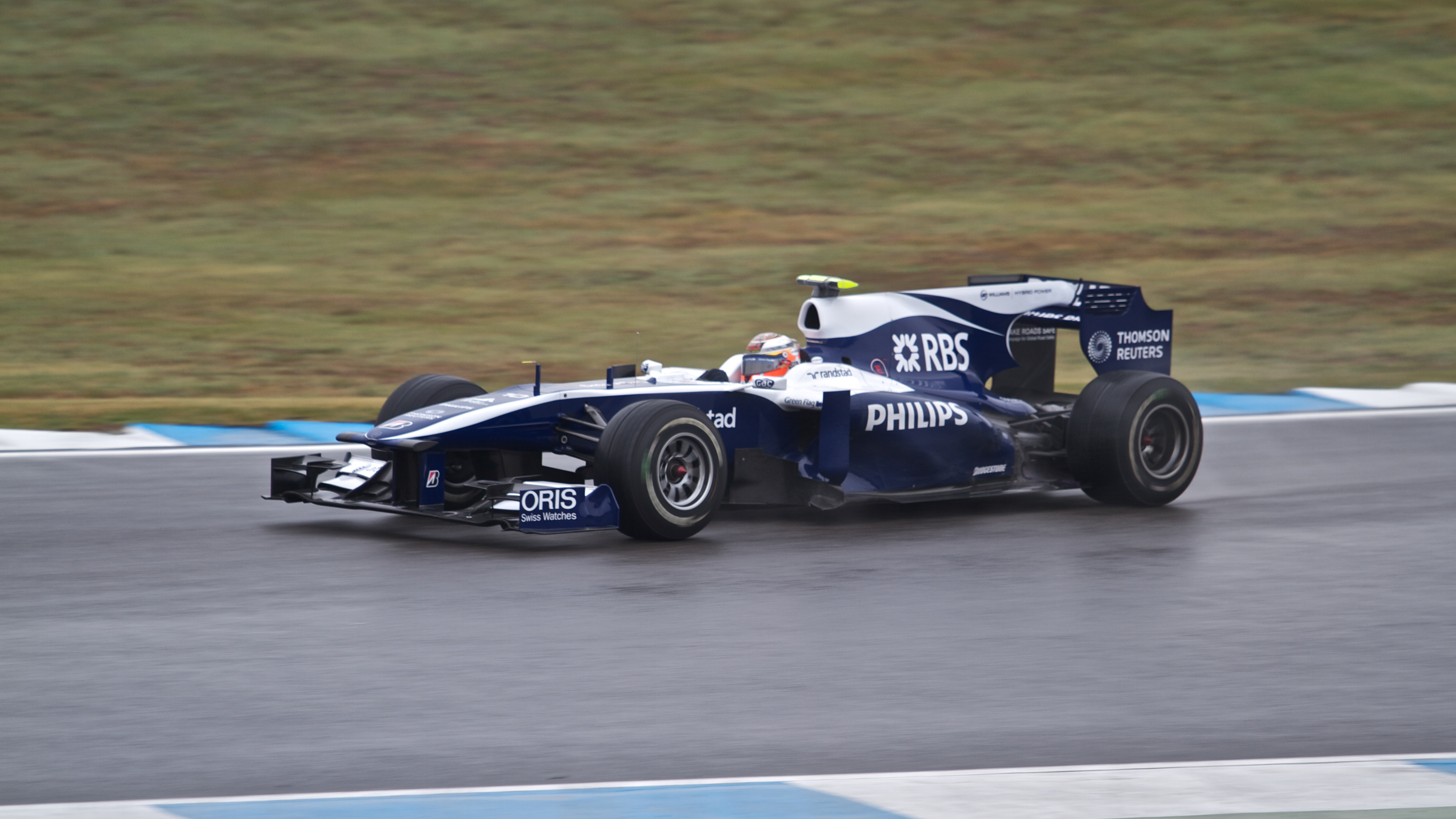 Nico Hulkenberg à Hockenheim en 2010